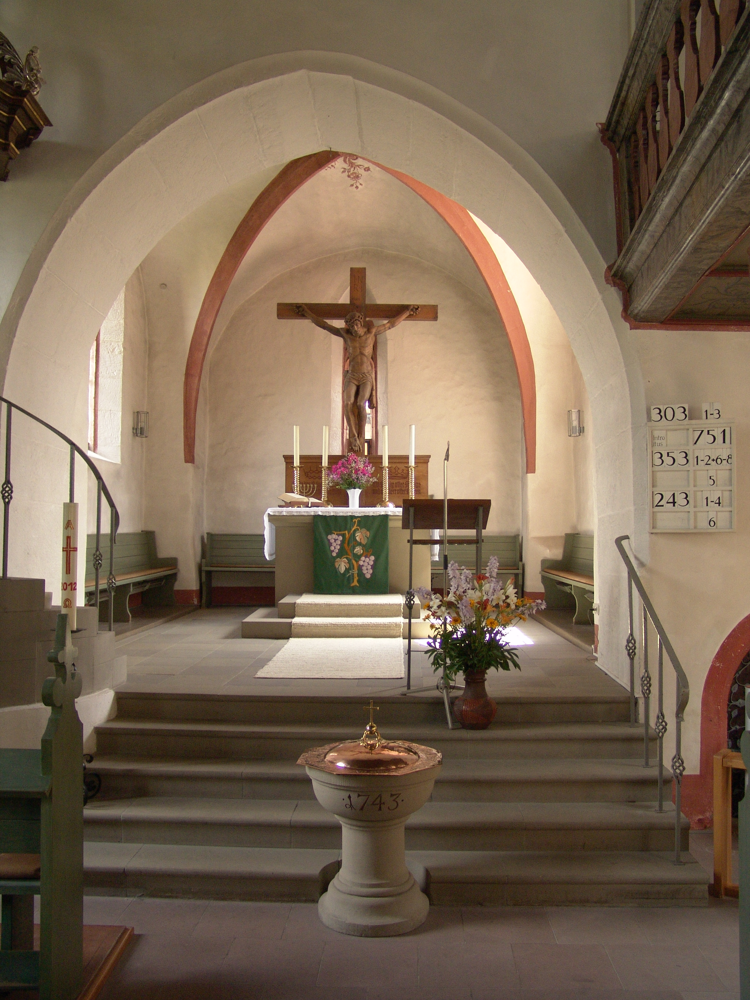 Zeilitzheim evang.-luth. Kirche St. Sigismund